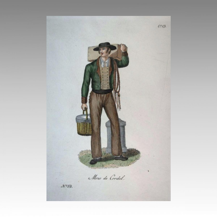 Grabado 'Mozo de cordel' (1825) en un catálogo de 'Trajes de España', dibujado por José Ribelles y Helip, con grabado de Juan Carrafa.